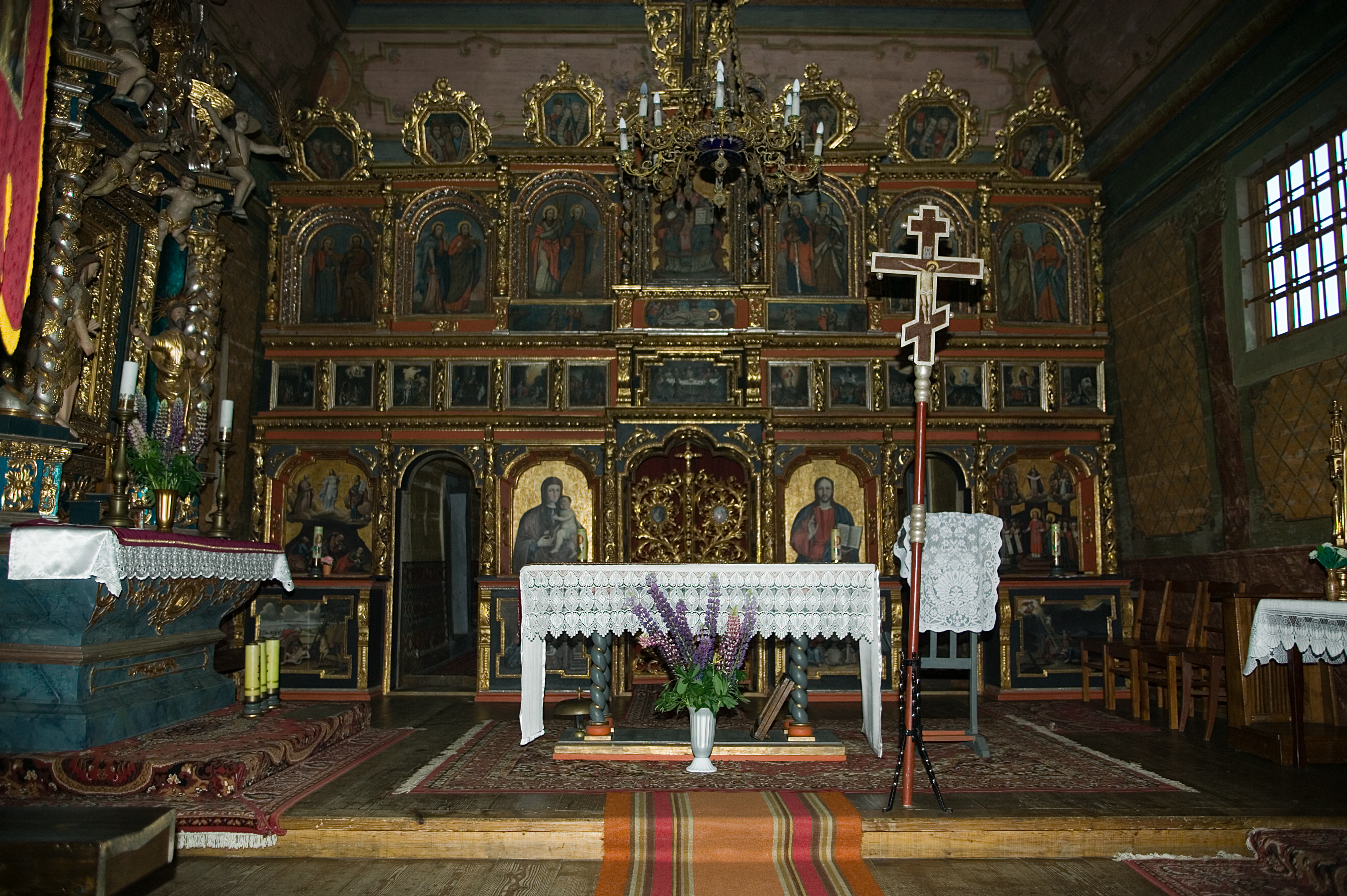 Owczary, dawna cerkiew greckokatolicka